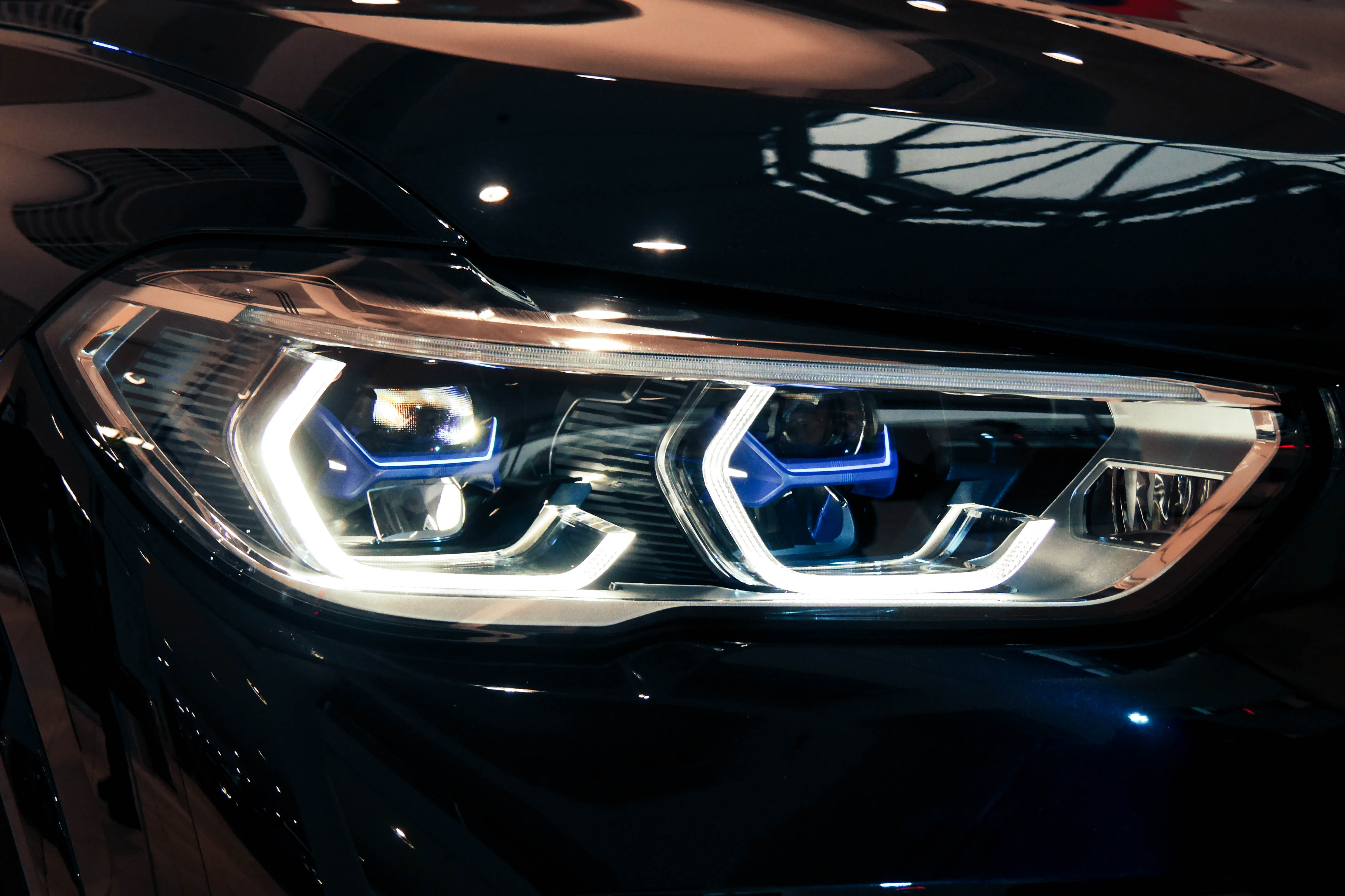 Erstmalig in der G05 Generation ist für den BMW X5 die Sonderausstattung BMW Laserlicht erhältlich.